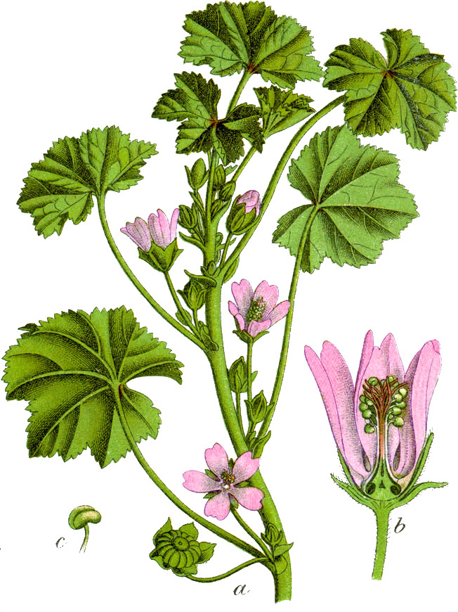 Malva neglecta Wallr. Original Caption Gemeine Malve, Malva neglecta